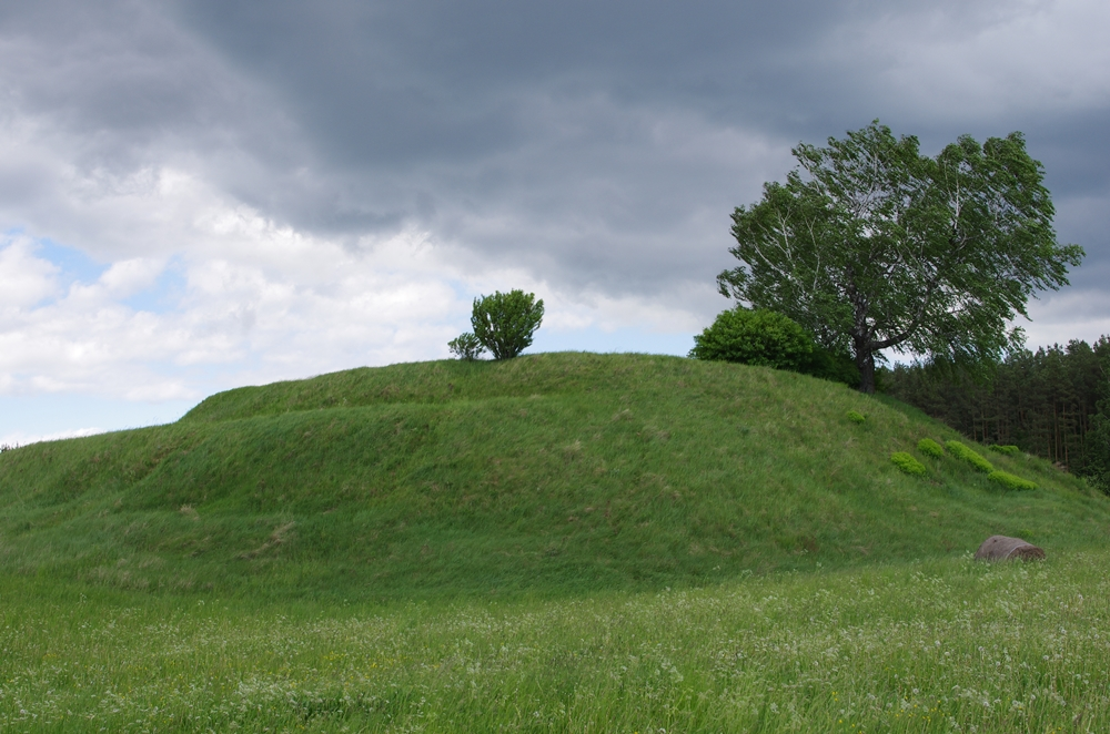 Kerelių piliakalnis